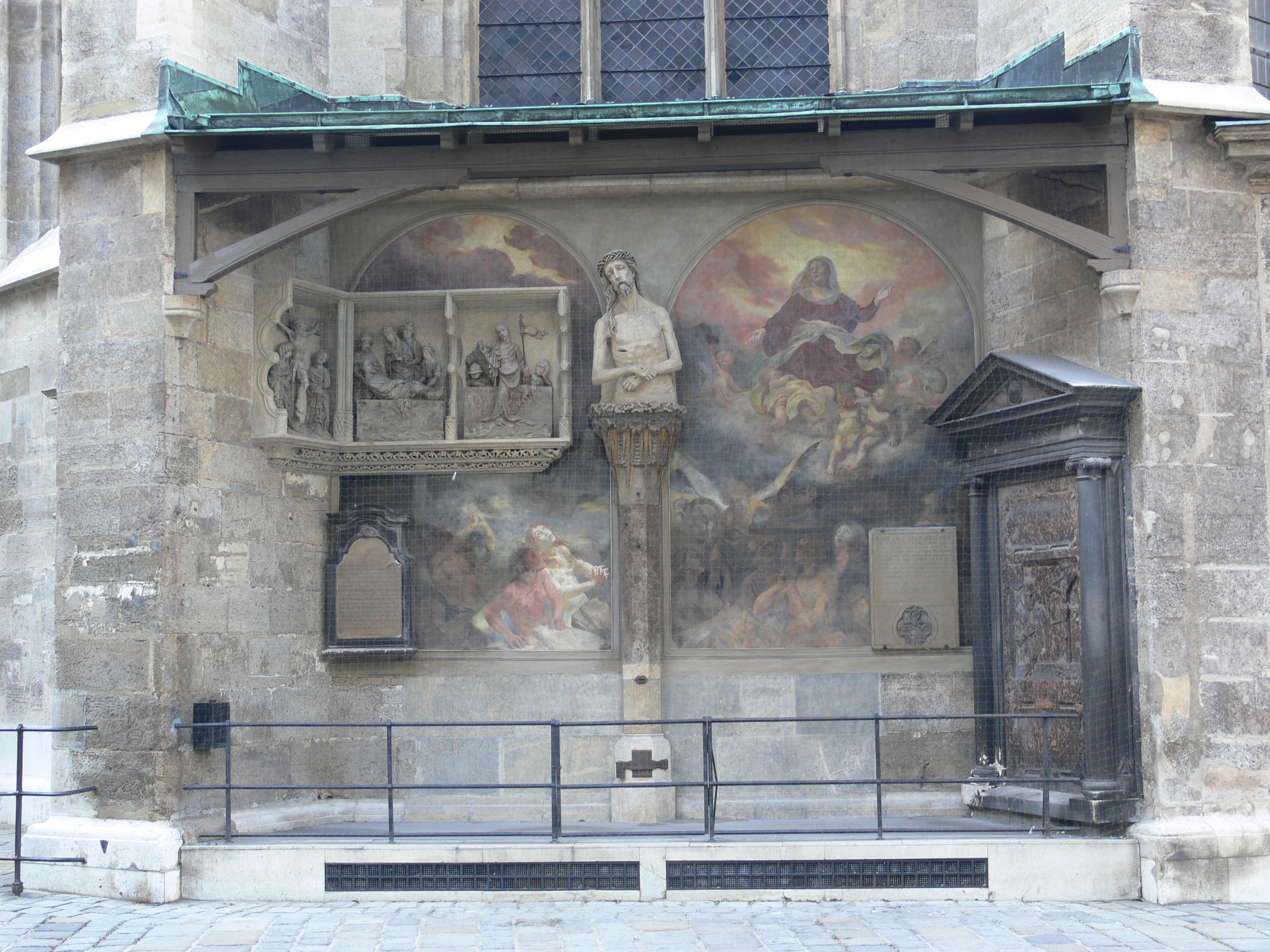 Wien, Stephansdom, "Zahnwehherrgott" und Epitaphe